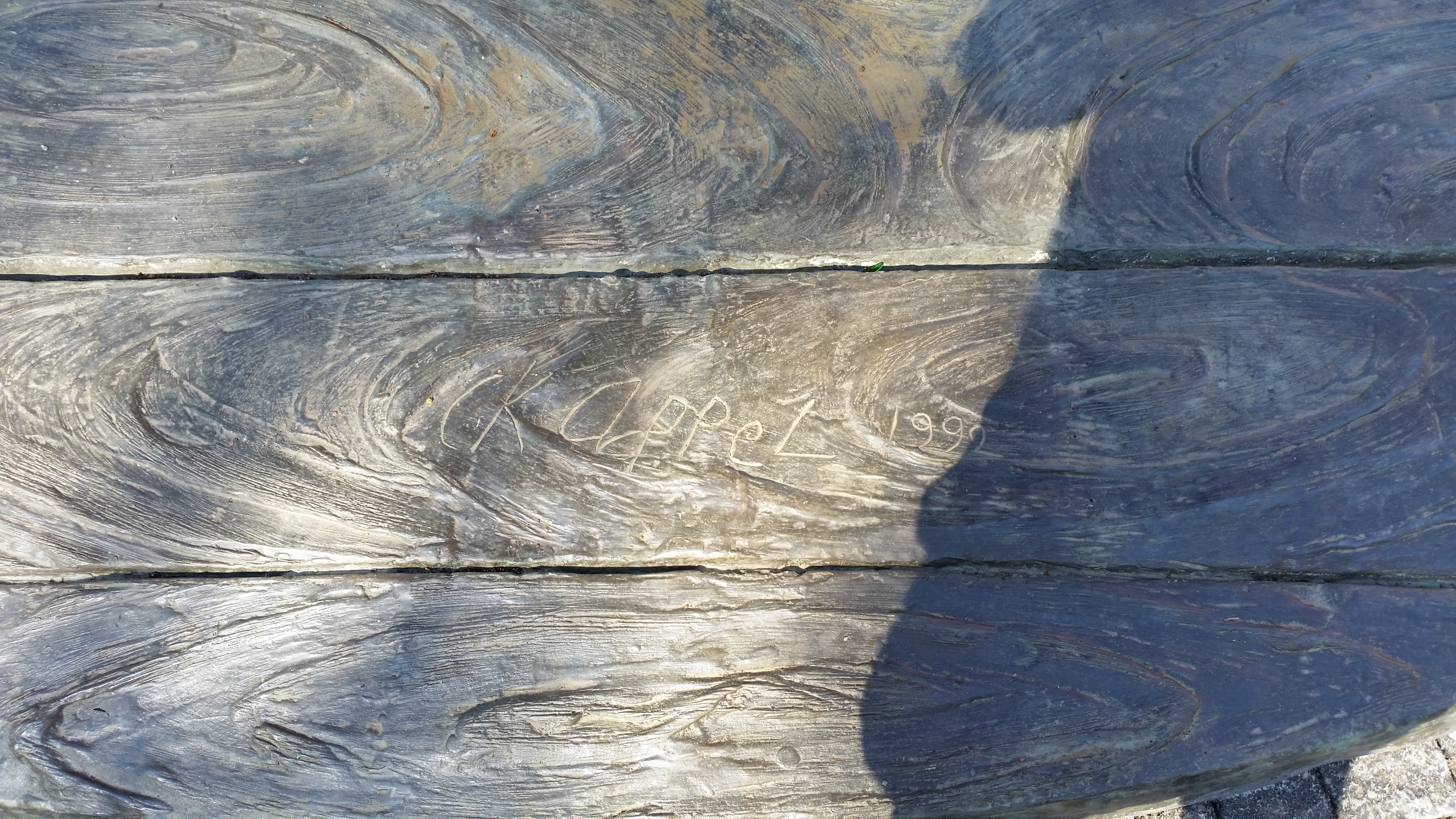 Impressie van The fountain van Karel Appel staande voor het Cobra Museum in Amstelveen (april 2020)